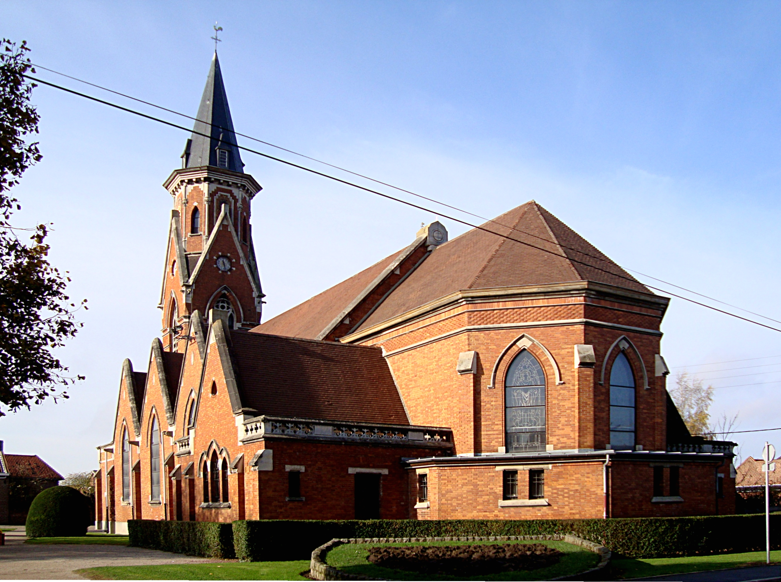 Vue arrière de l'église Saint-Vaast d'Illies (Nord). Détruite au cours de la première guerre mondiale, elle a été reconstruite après 1918.